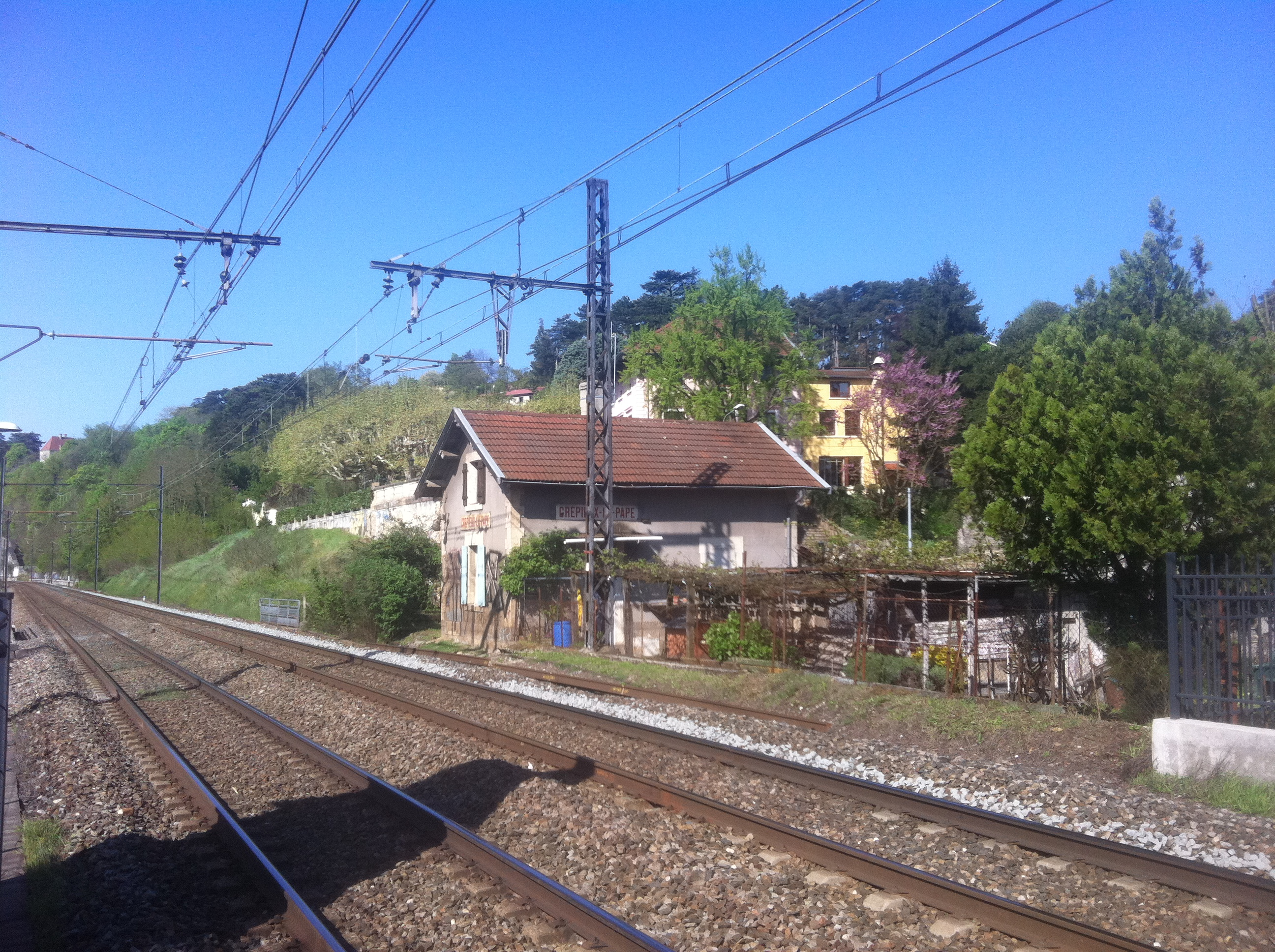 Voies ferrées direction Lyon Part-Dieu, à la gare de Crépieux-la-Pape.